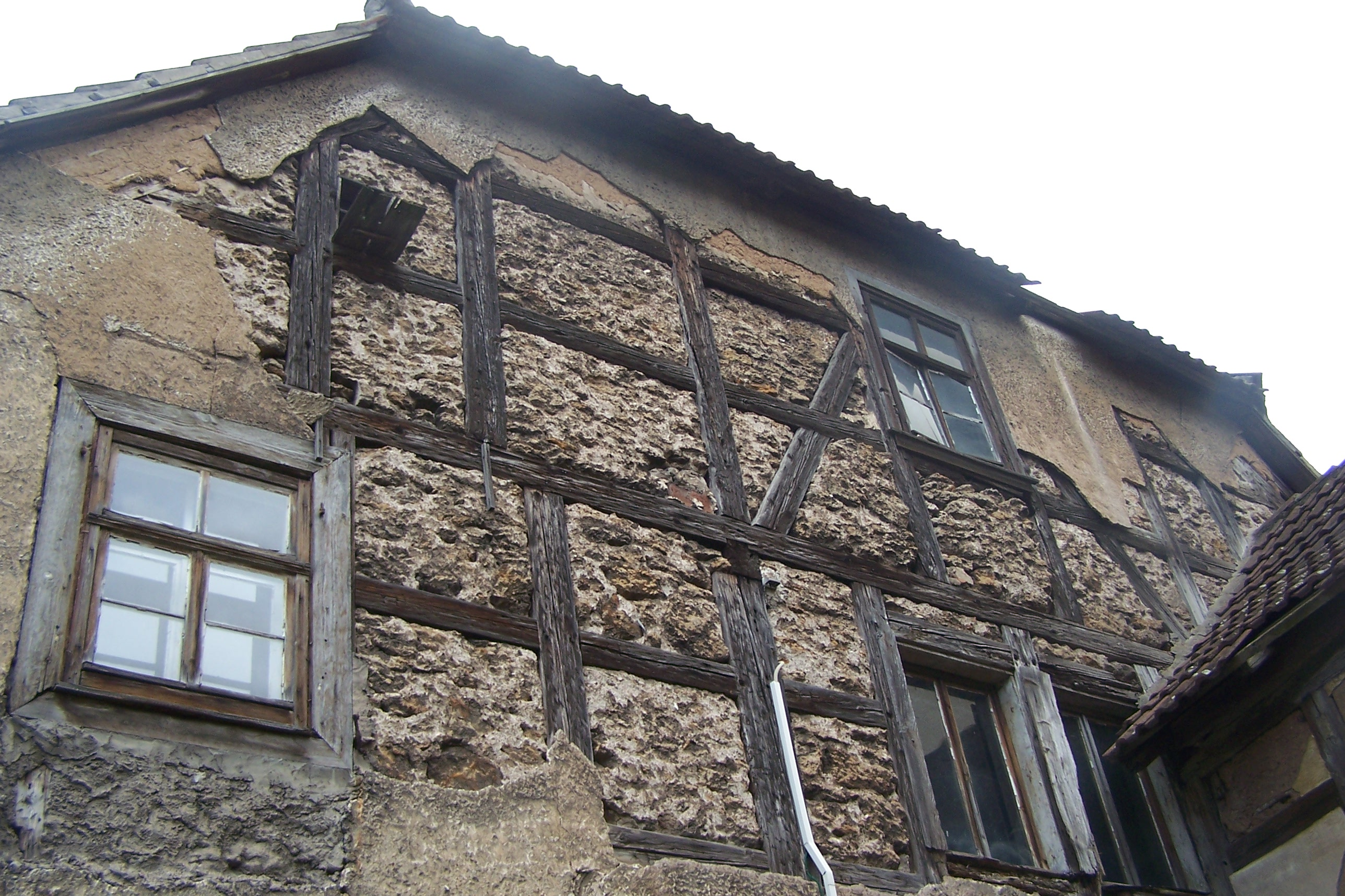 GTH Mechterstädt, Ostflügel 02